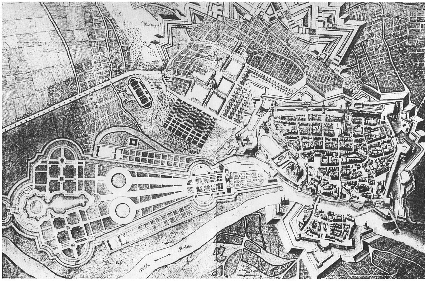 Kassel: Obere Neustadt, Weinberg und Karlsaue